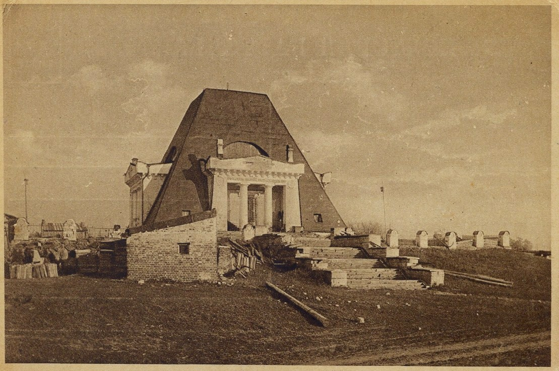 Храм-памятник воинам, павшим при взятии Казани в 1552 году (Храм-памятник в честь Нерукотворе́нного Образа Спасителя) (г. Казань). Надписи на оборотной стороне открытки: «Почтовая карточка. Poṡta karto. Место для марки. Издание Контрагентства Печати. № 461. Казань. Памятник павшим воинам в 1552 году. Главлит № А3654. Тираж 5000. Меццо-тинто Ф.Верщецкого. Москва.».